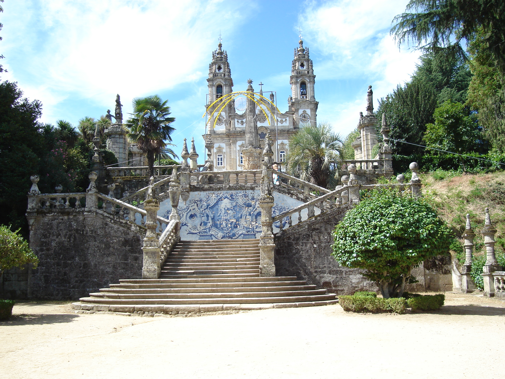 Imagem tirada num dos patamares do Santuário da Nossa Senhora dos Remédios em Lamego.